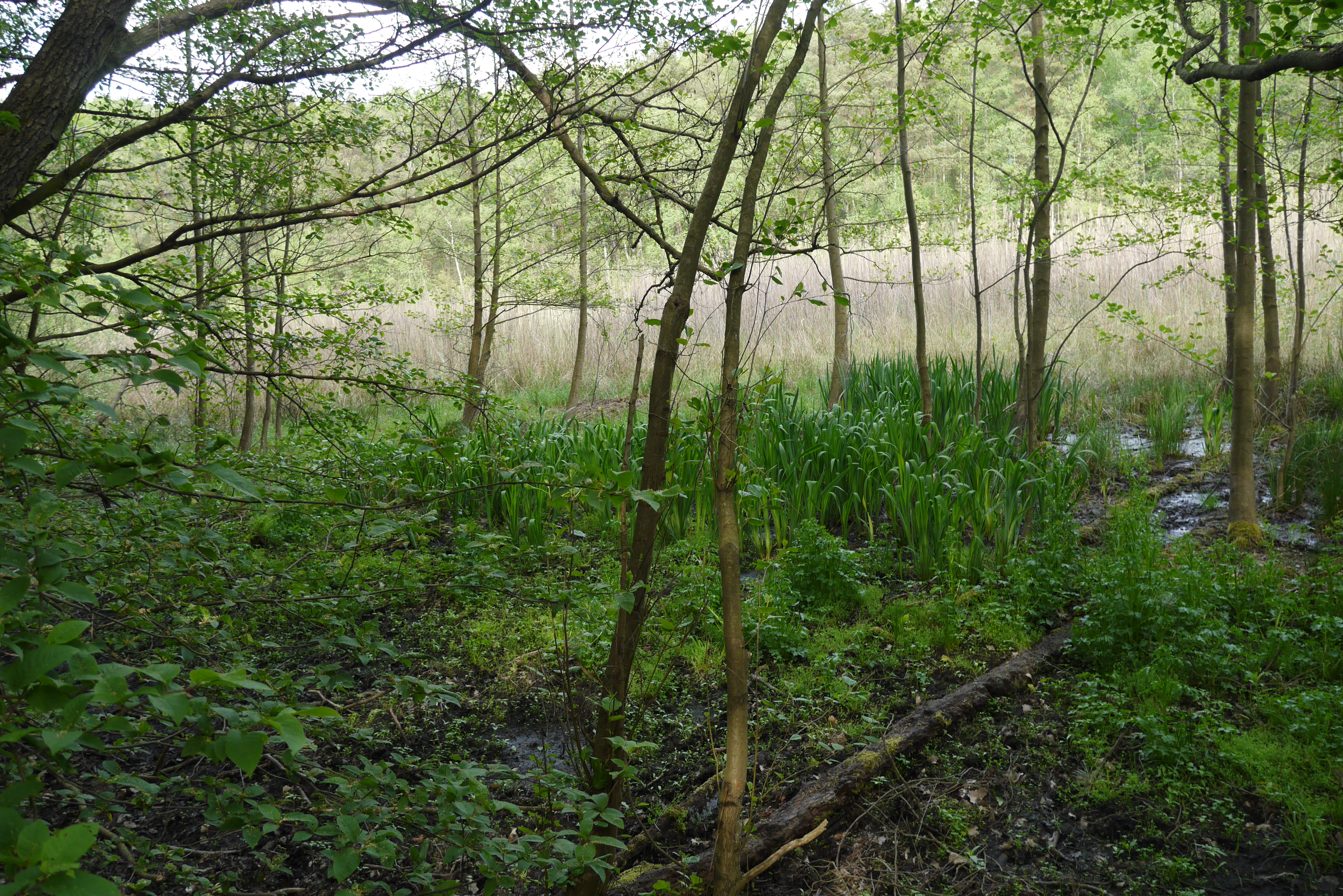 Der Barssee ist seit den 1970er Jahren ausgetrocknet, Restbestände sind kaum sichtbar. Jagen 118/119, Grunewald, Berlin, Forsthaus, Alte Saubucht.